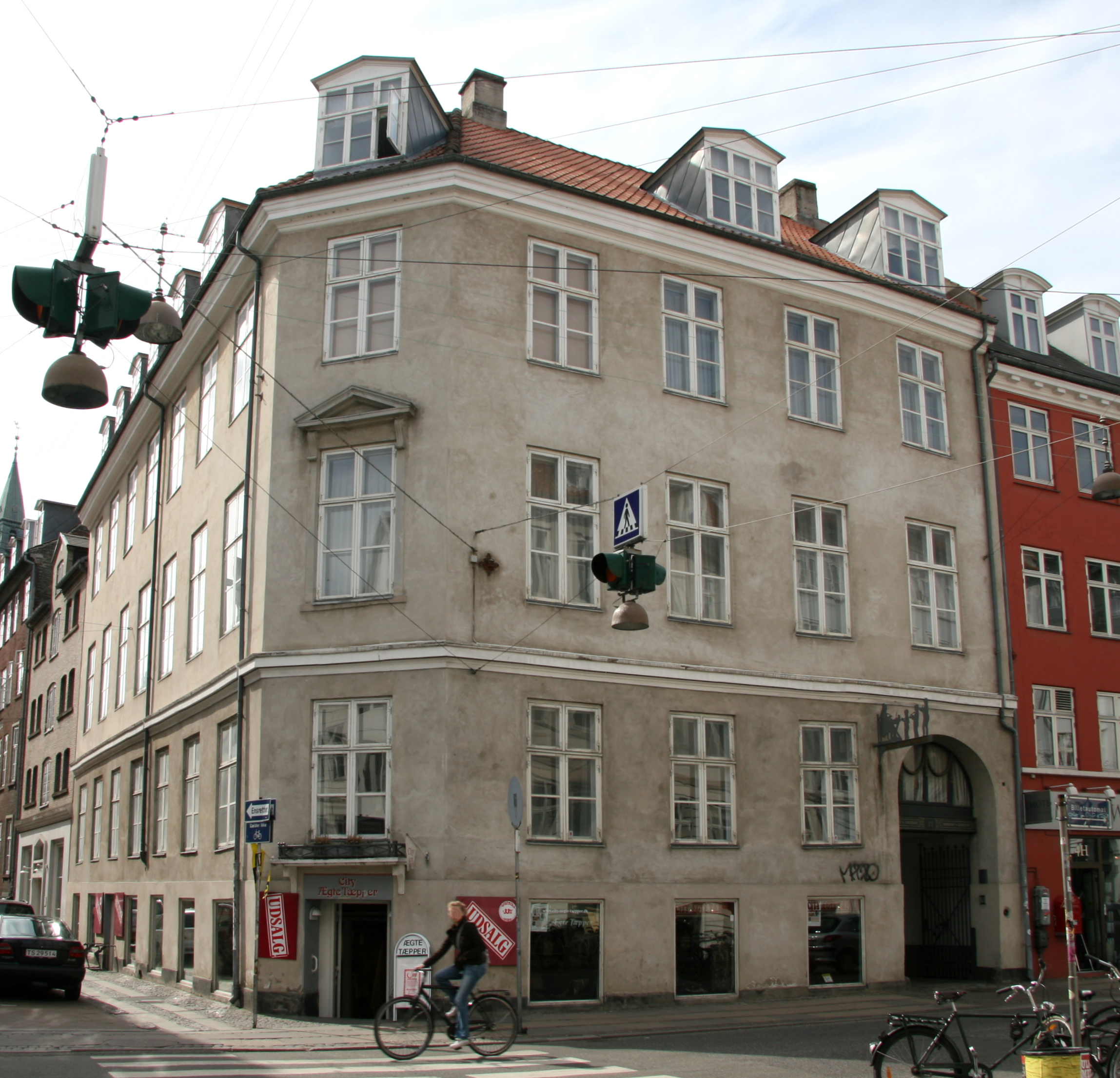 Dansk Skolemuseum (Danish School Museum) in Copenhagen.